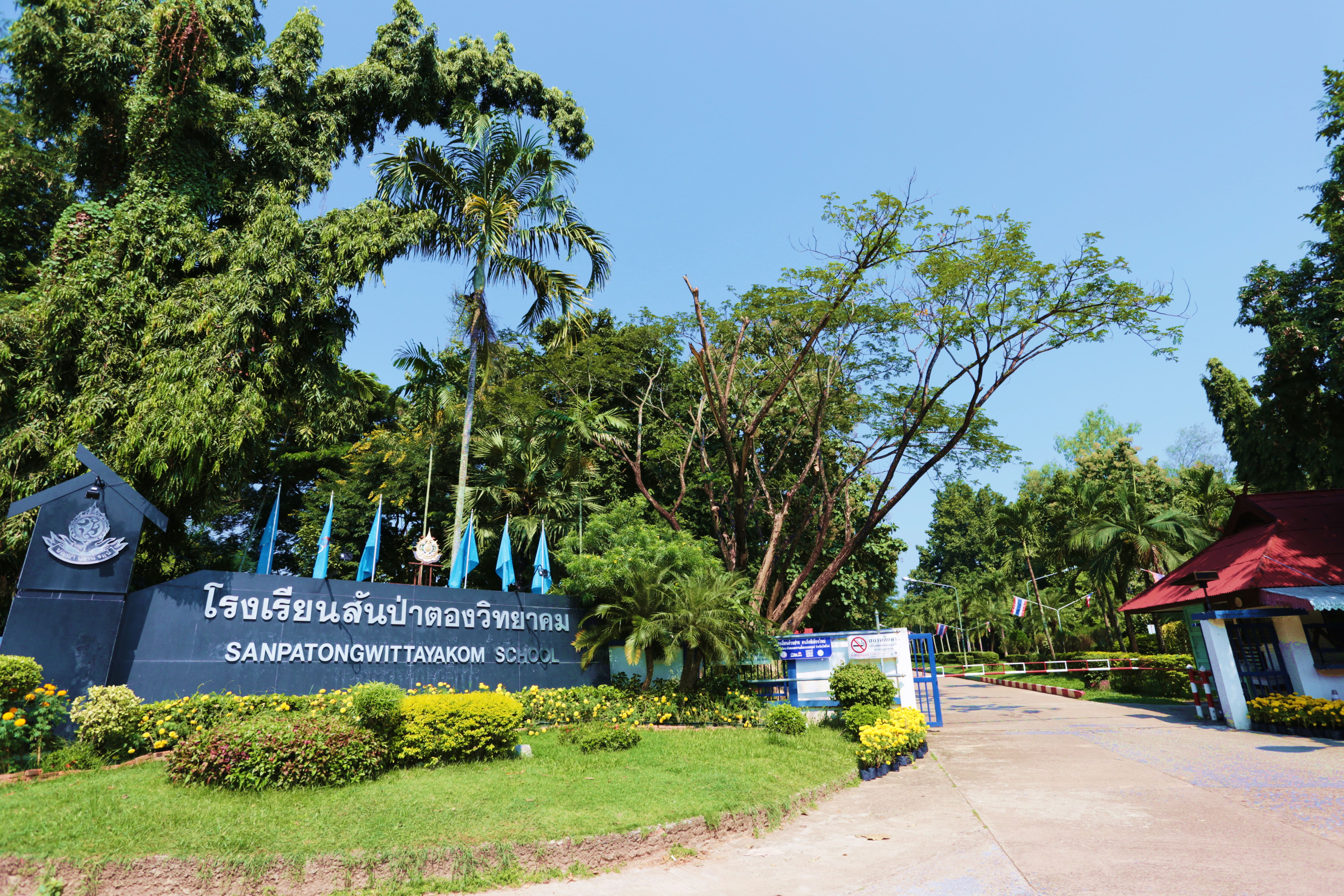 หน้า ส.ว.